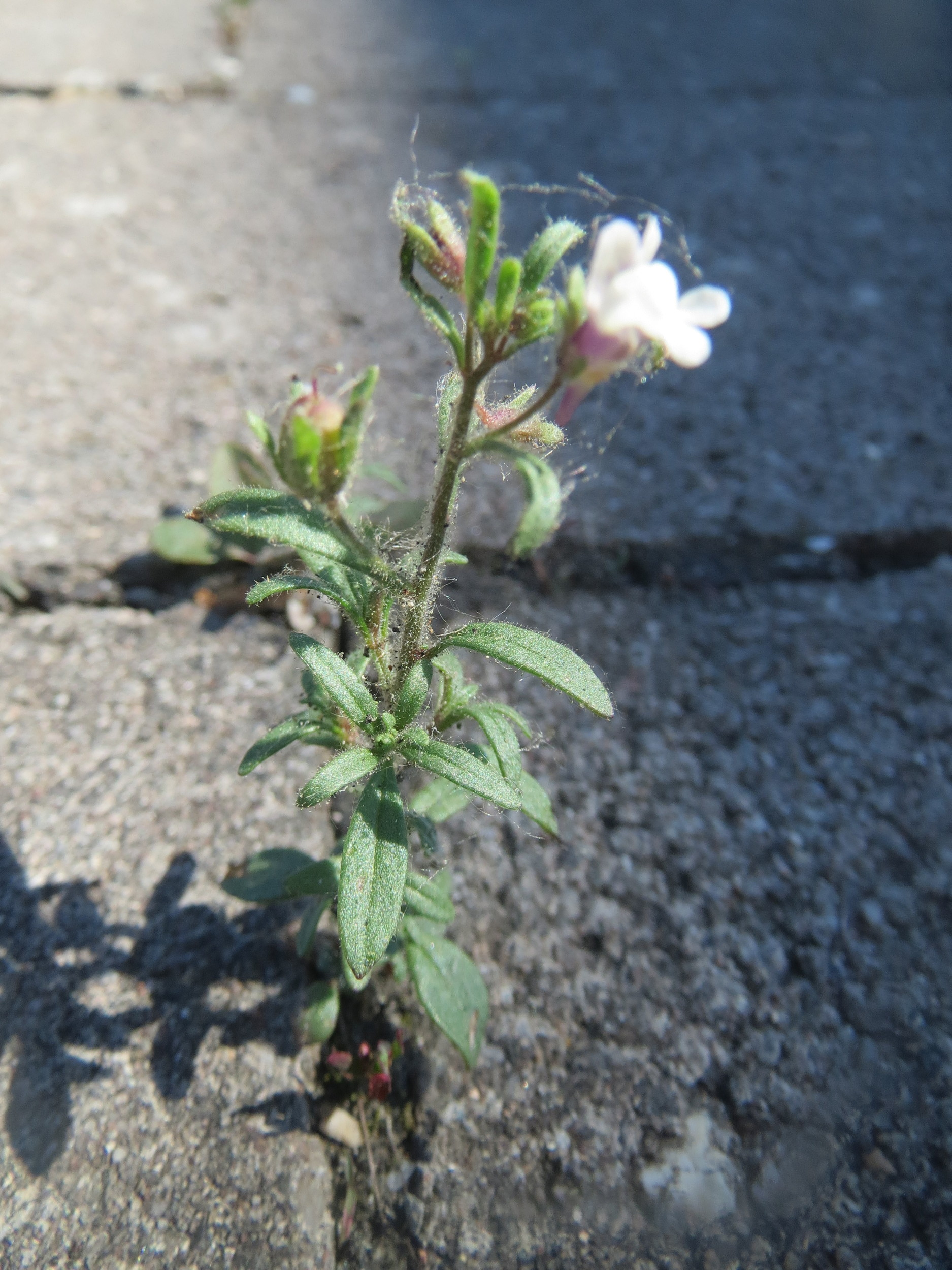 Ritzenbotanik: Kleines Leinkraut (Chaenorhinum minus) am Bahnhof Kirkel